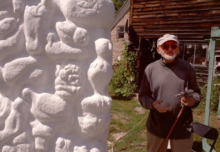 Carmen d'Avino (1918-2004), sculptor, animator.